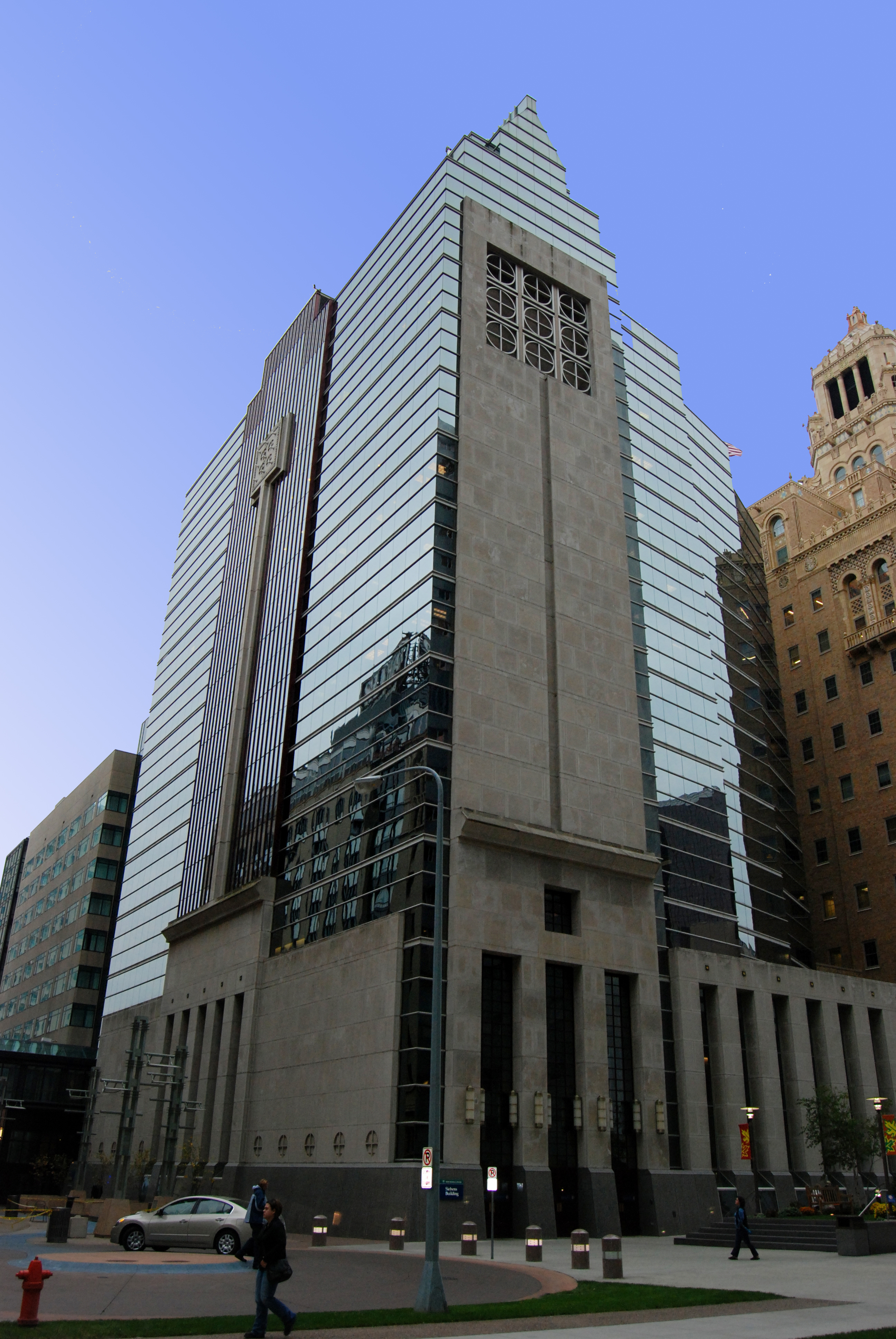 Rochester